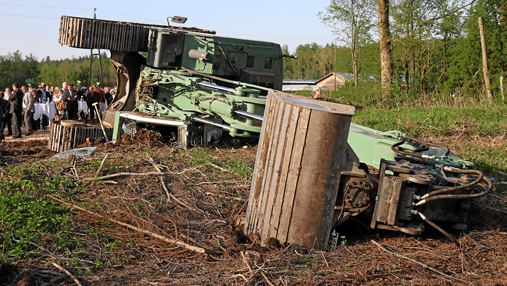 Baggerunfall des bay. Innenministers Herrmann beim Ersten Spatenstich für die Nordspange in Kempten, lt. Recherche ein Liebherr R 944 mit Verstellausleger, Einsatzgewicht ca. 38 Tonnen